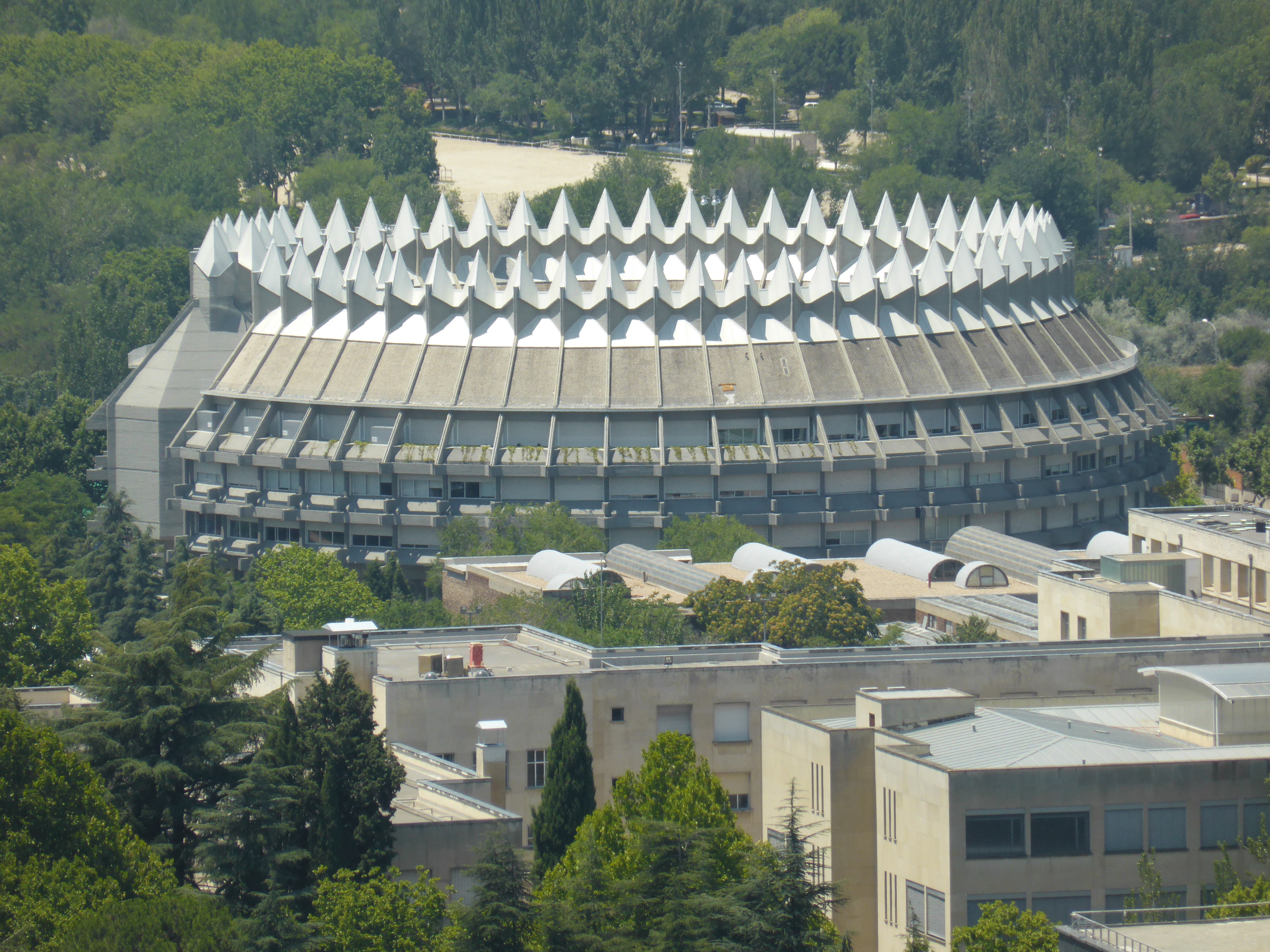 La sede del "Instituto del Patrimonio Cultural de España" se encuentra en la Ciudad Universitaria de Madrid, en un inmueble de planta circular, coronado por agujas o espinas. La fotografía está tomada desde el mirador del Faro de Moncloa.